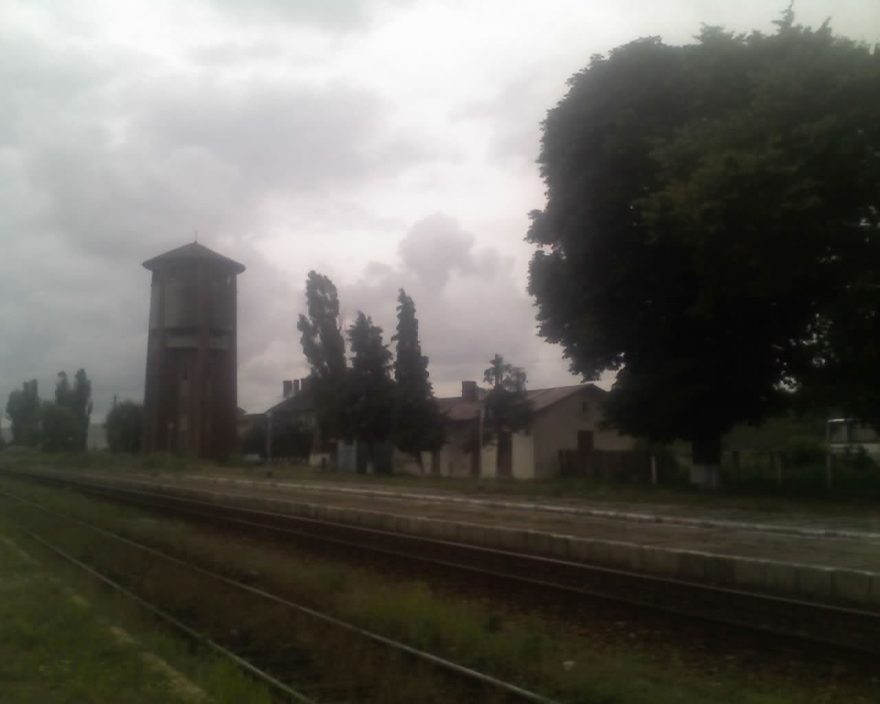 Turnul de apă din Buhăieşti